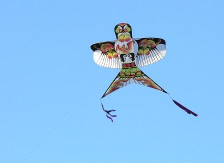 北京传统的沙燕风筝 摄于zh:德胜门公园